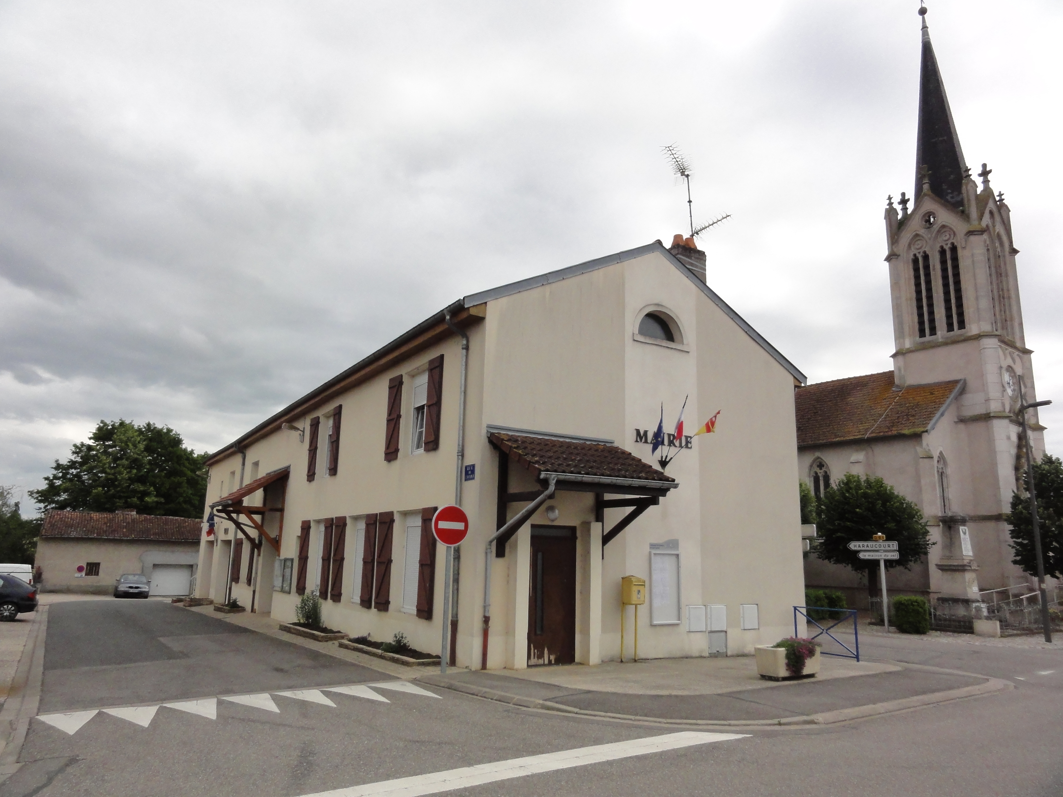 Buissoncourt (M-et-M) mairie et église